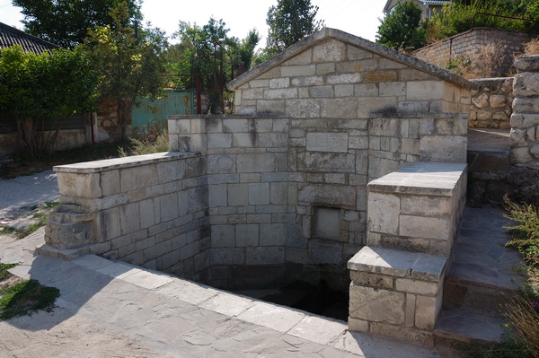 Фонтан Селіма ІІ Ґерая. Назва за держреєстром пам'яток: "Фонтан 18-19 стт."